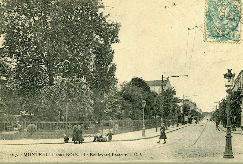 Le boulevard Pasteur, Montreuil-sous-Bois